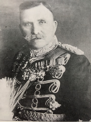 Генерал Александар Станковић